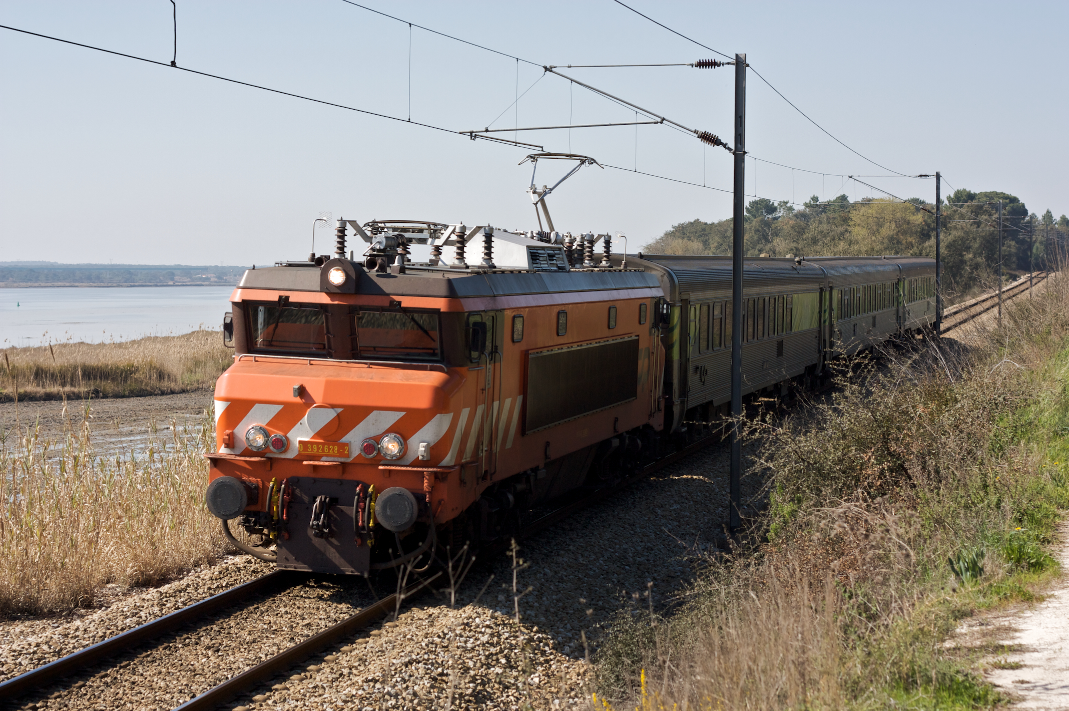 Tipo: Comboio Intercidades 570 [Lisboa • Oriente - Faro] Local: Alcácer do Sal [Linha do Sul, PK 71] Data e hora: 23 de Fevereiro de 2009 [11h41] Material: Locomotiva 2628 + 3 carruagens Sorefame Renovadas